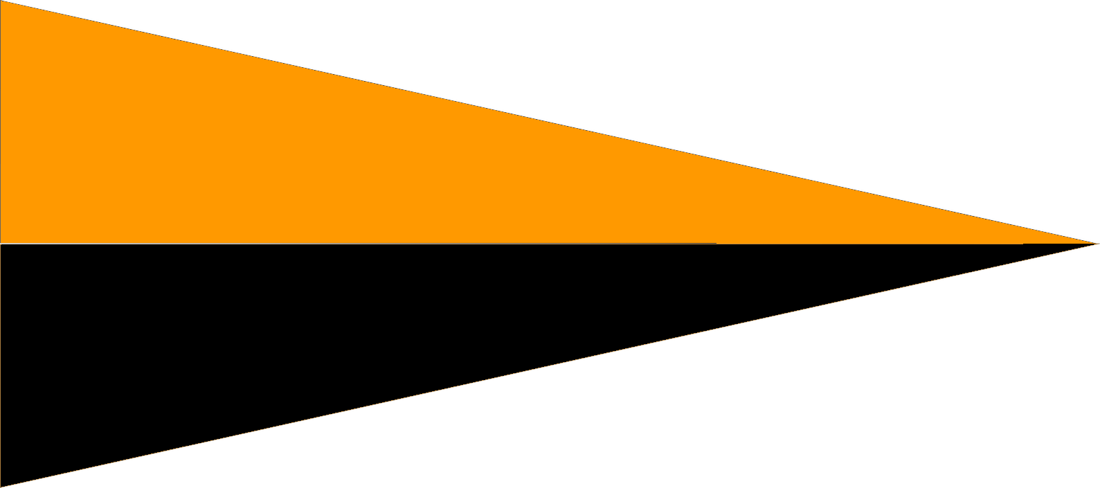 LWP Proporczyk jednostek przeciwpancernych